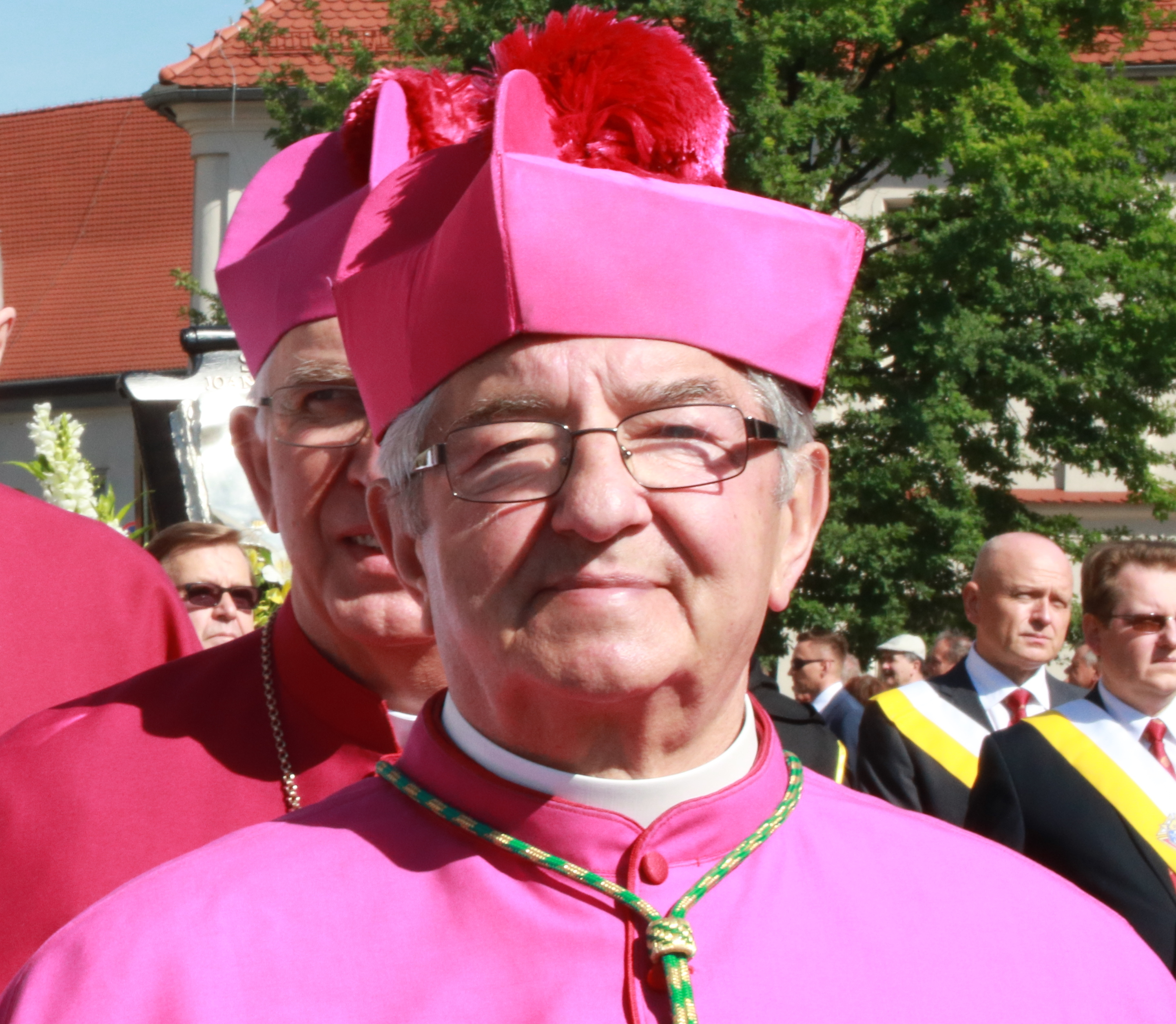 Abp Sławoj Leszek Głódź podczas uroczystości ku czci św. Stanisława w Krakowie